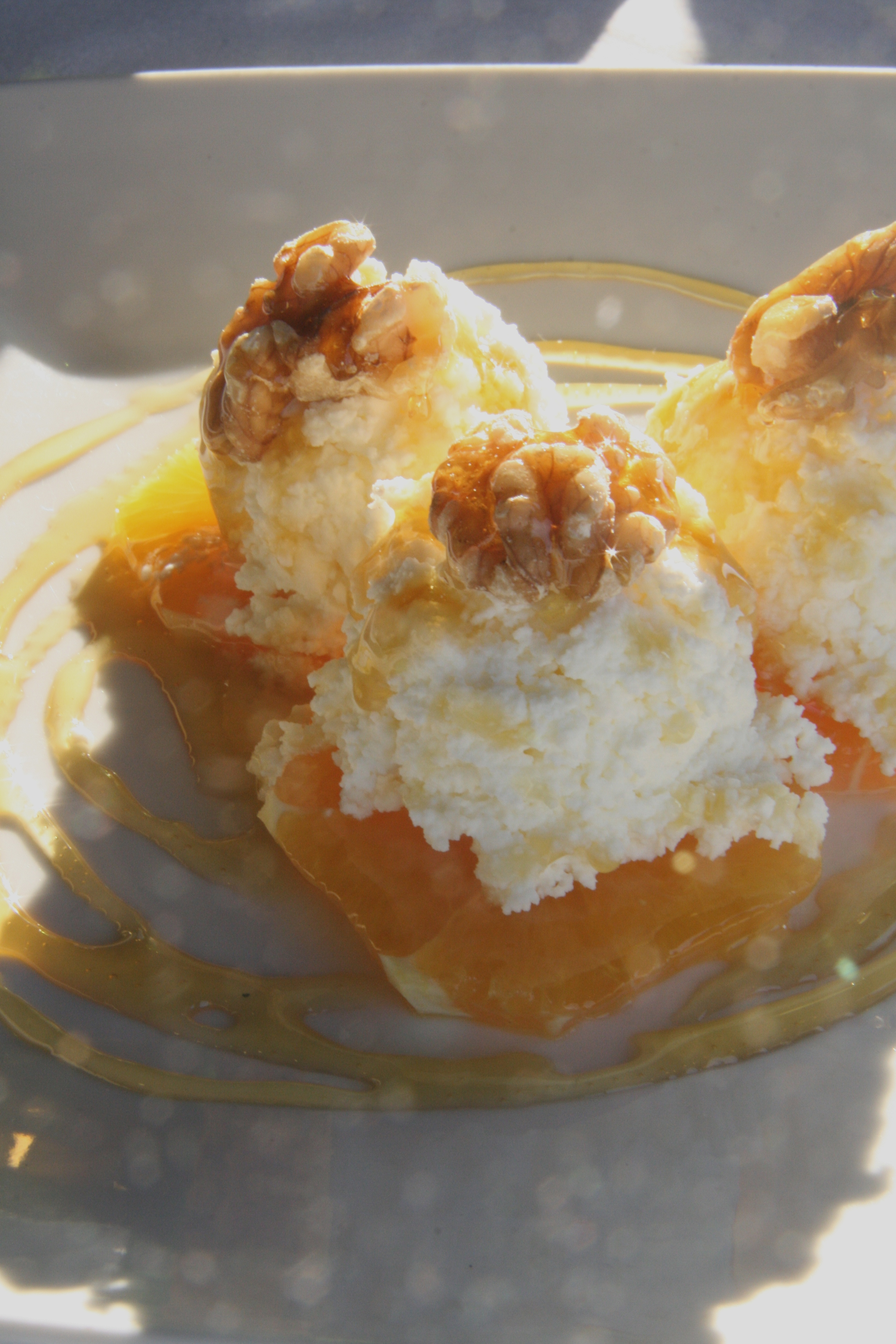 Mel i Mato